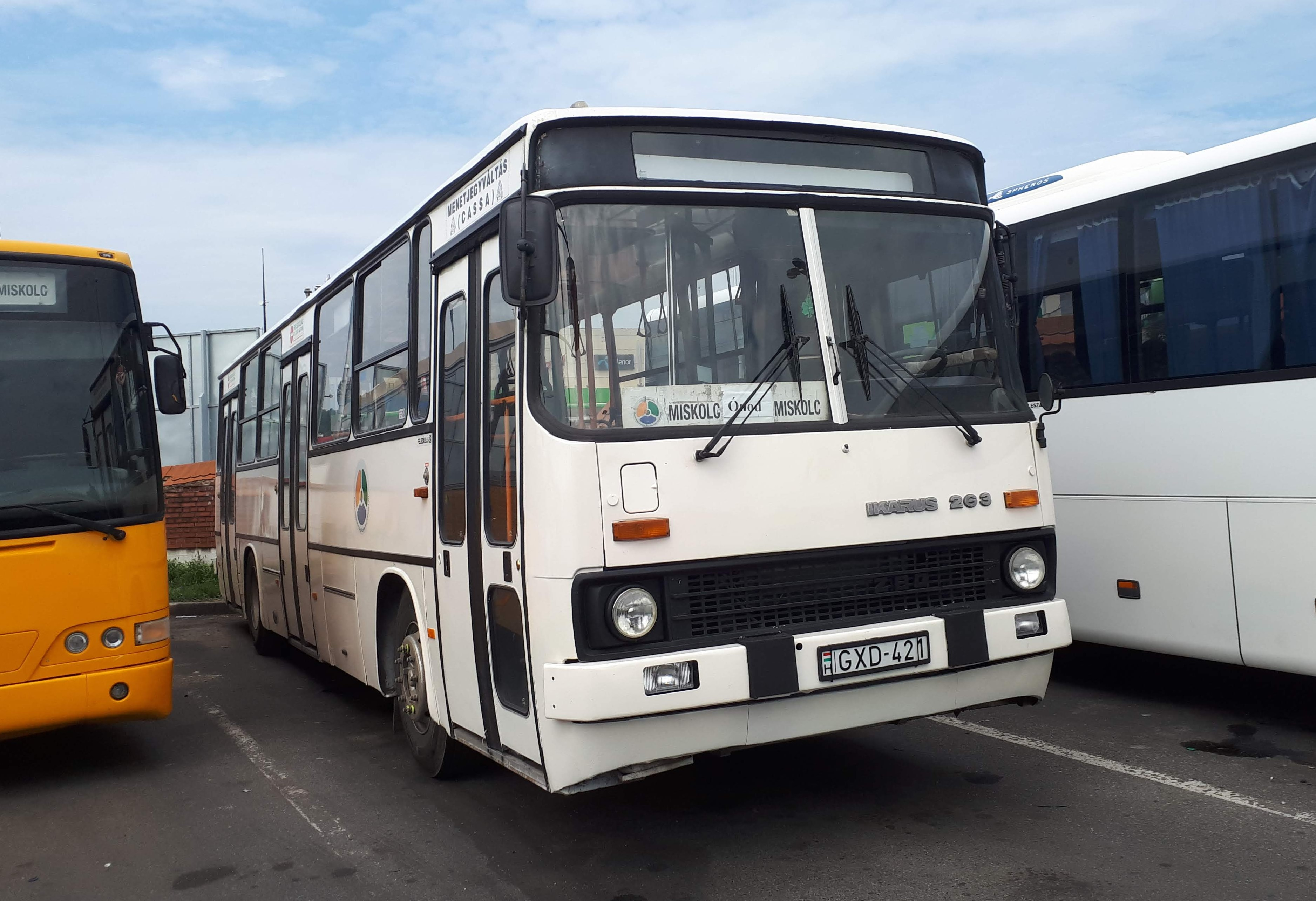 Az ÉMKK GXD-421 rendszámú Ikarus 263 típusú busza Miskolcon, a 3735-ös helyközi járaton.